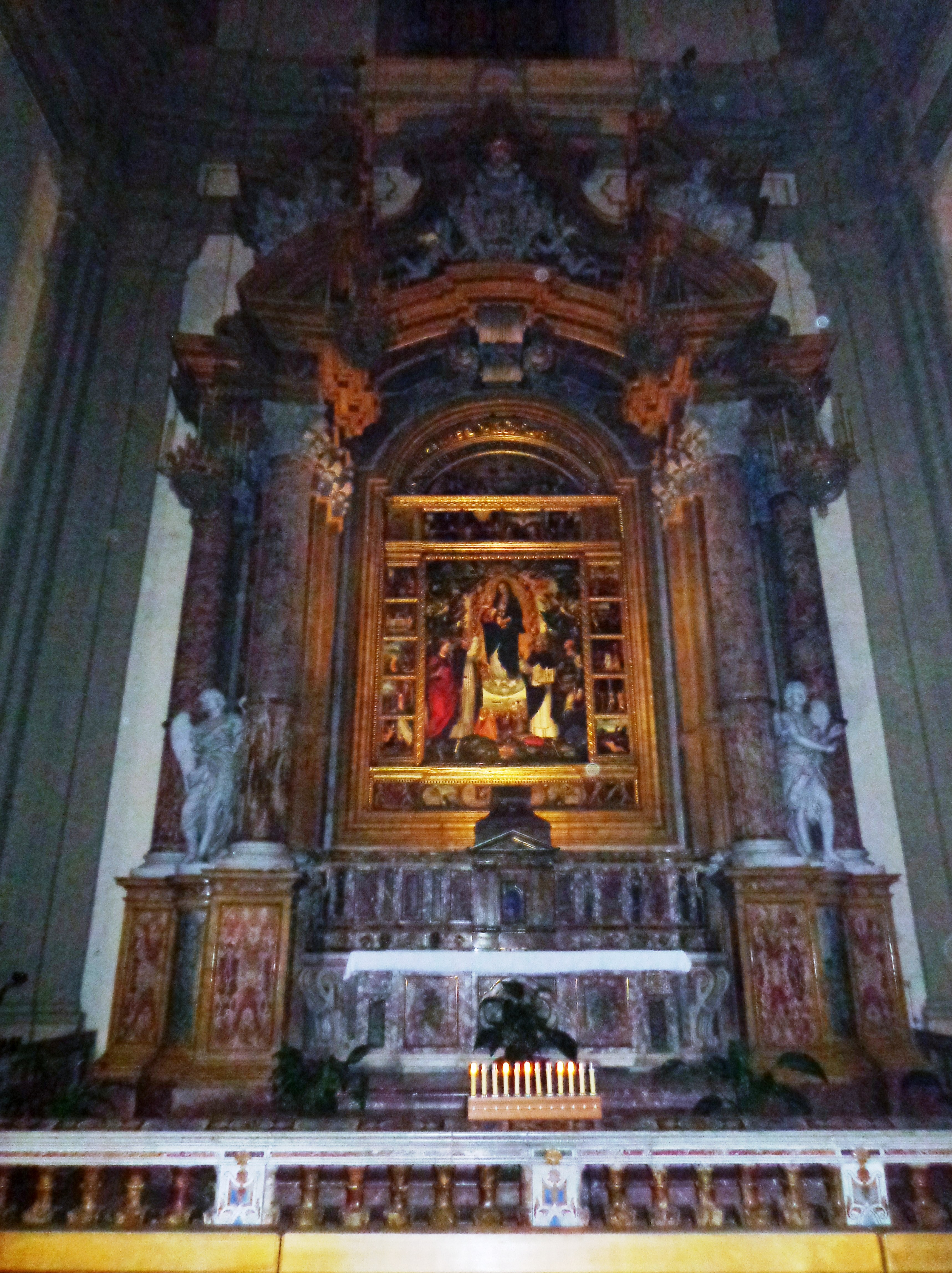 San Domenico PA 08